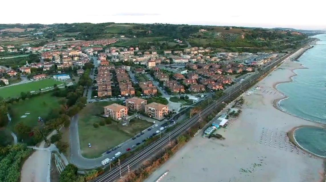 Marina di Altidona, lungomare